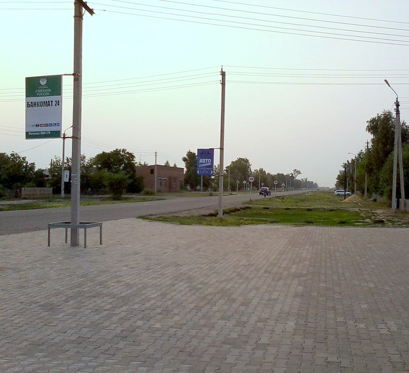 Село Гальбштадт. Центр Немецкого национального района.